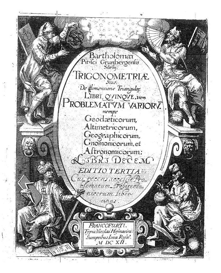 Bartholomaei Pitisci Grunbergensis Silesij Trigonometriae siue De dimensione triangulor[um] libri quinque item Problematum varioru[m] nempe geodaeticorum, altimetricorum, geographicorum, gnomonicorum et astronomicorum libri decem. - Editio tertia: cui recens accessit Problematum architectonicorum liber unus. - Francofurti : typis Nicolai Hofmanni, sumptibus Ionae Rosae, 1612. - 2 pt. ([8], 183, [3]; 270 p.) : ill. ; 4º. - VD17 23:244037Q .